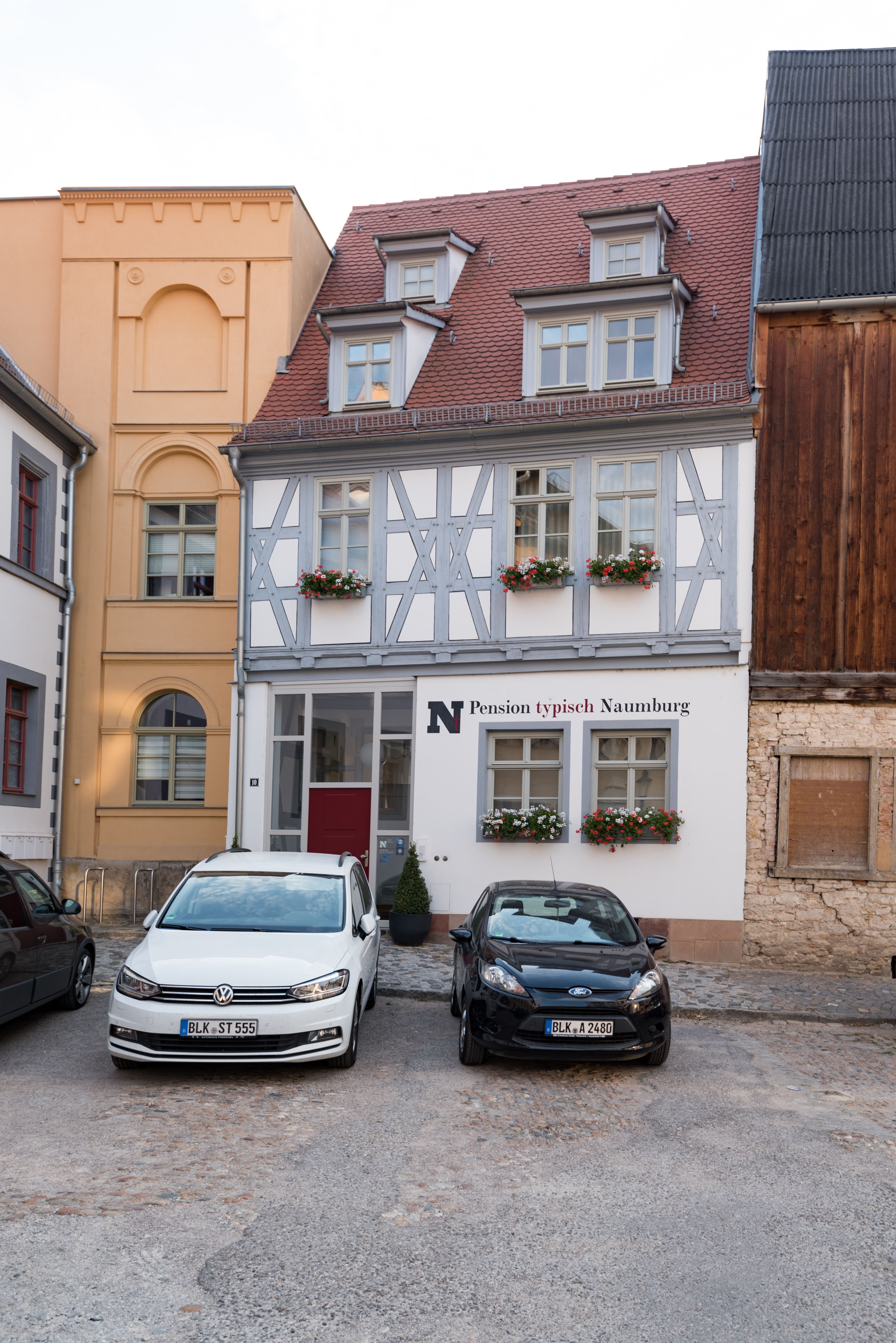 Naumburg (Saale), Reußenplatz 10